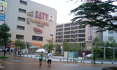 妙典駅南口周辺の様子